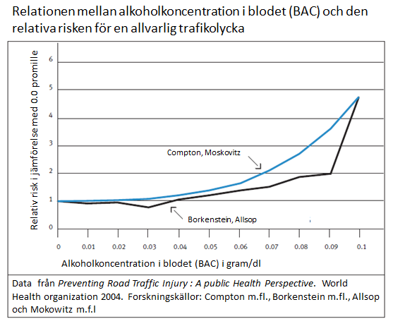 Graf relativ risk för olycka med alkohol i blodet